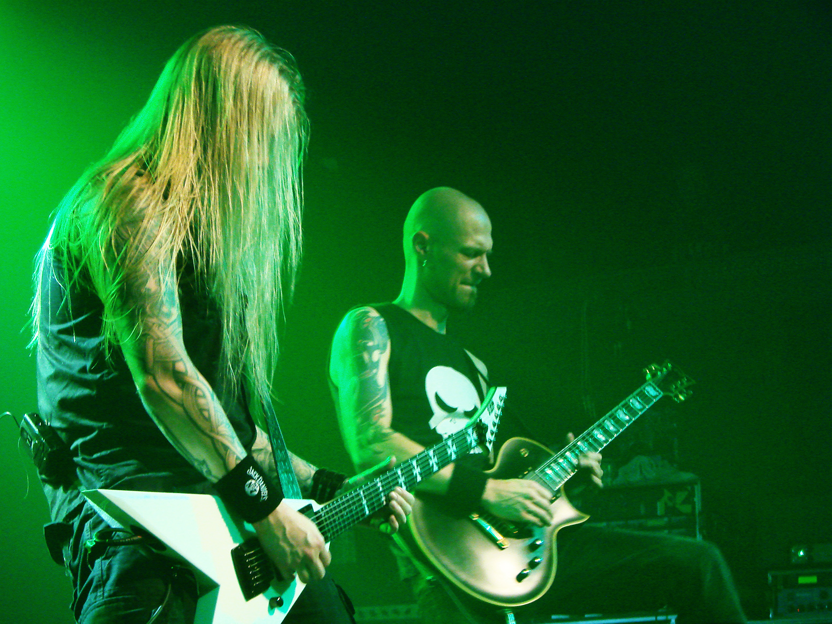 Soilwork en concert à Paris, à la Locomotive, le 12/10/07.